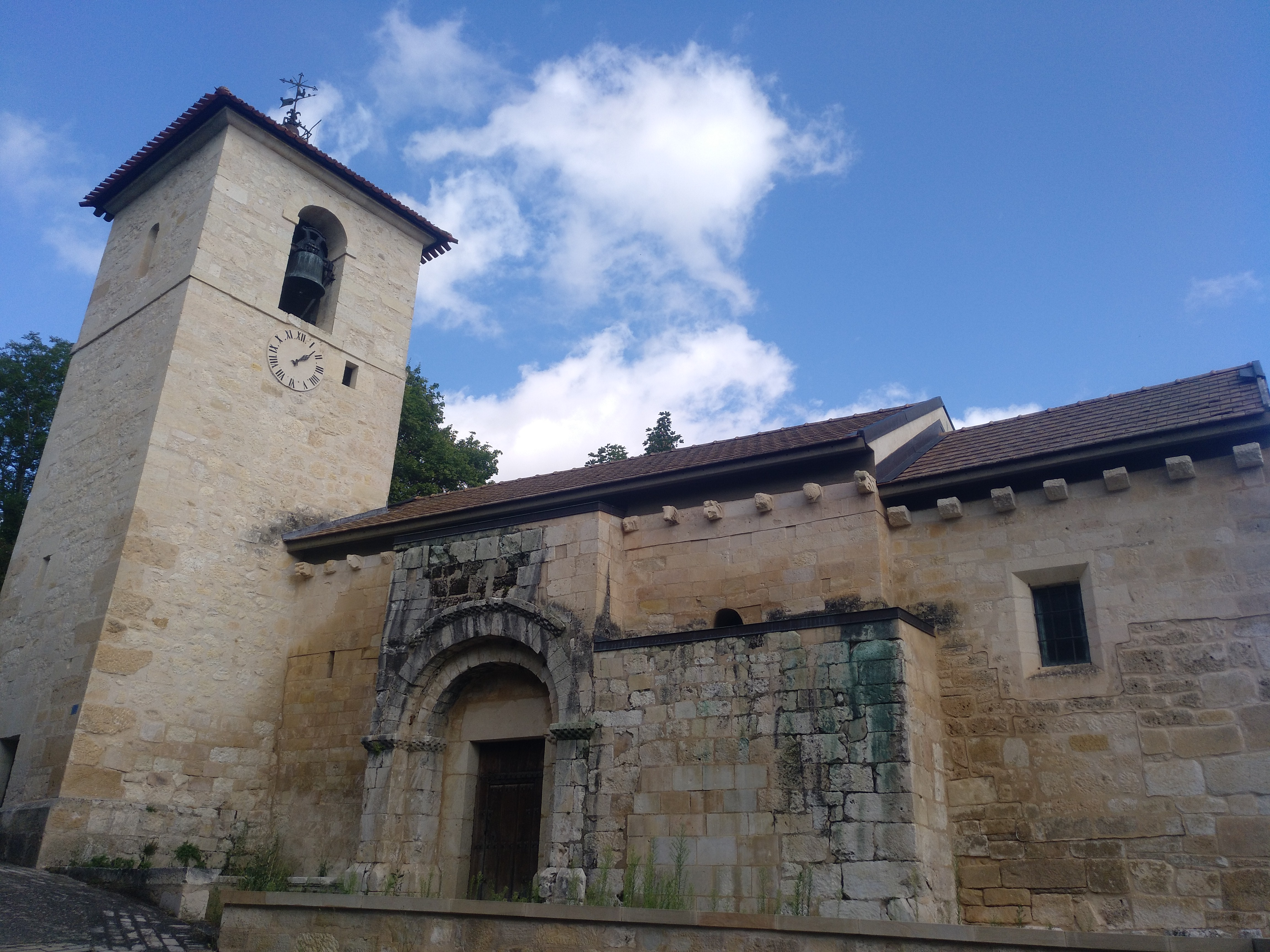 Tobillasko Durruma eliza, Arabako zaharrena (IX. mendekoa)